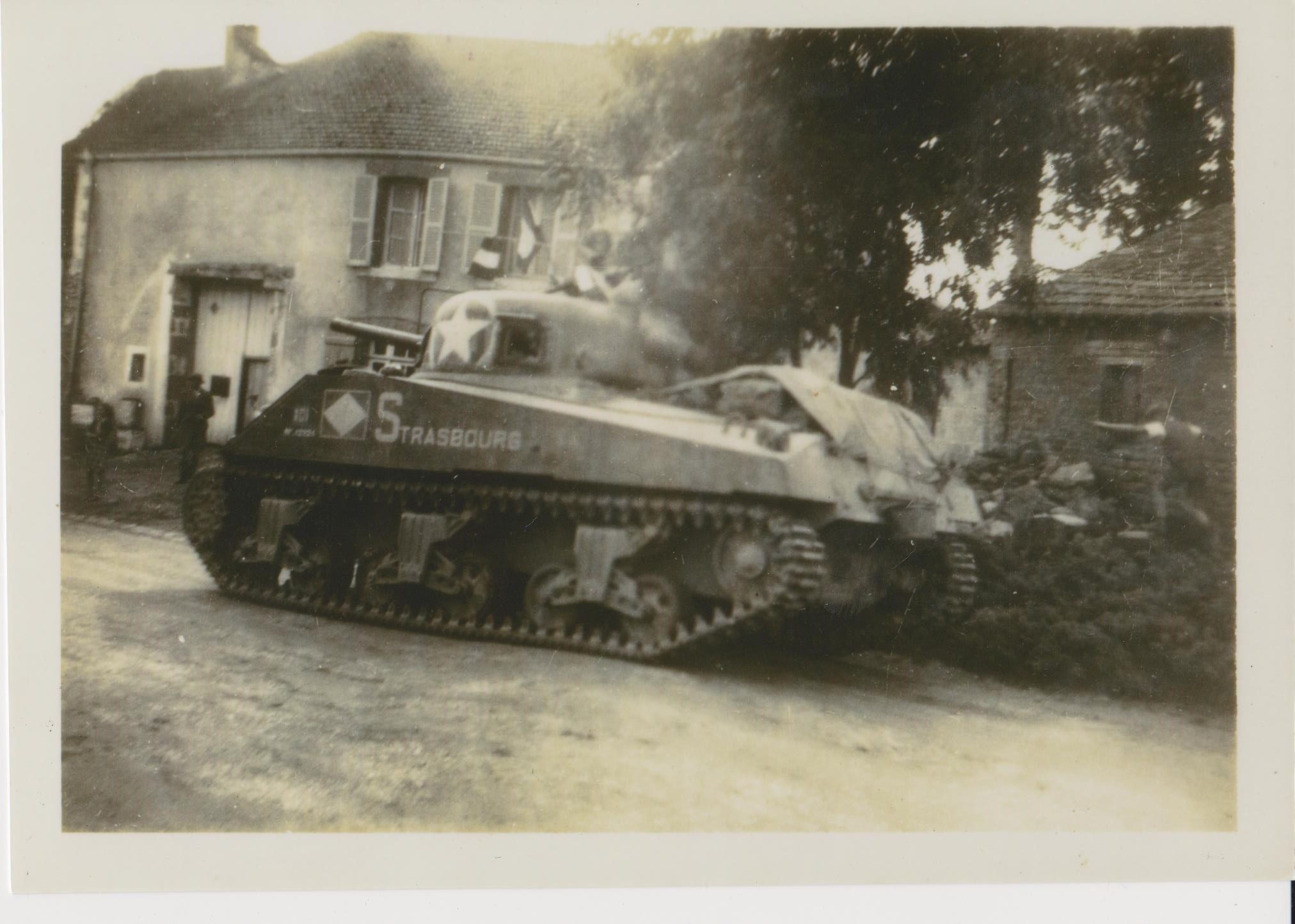 Heuilley-Cotton La libération 13 09 1944